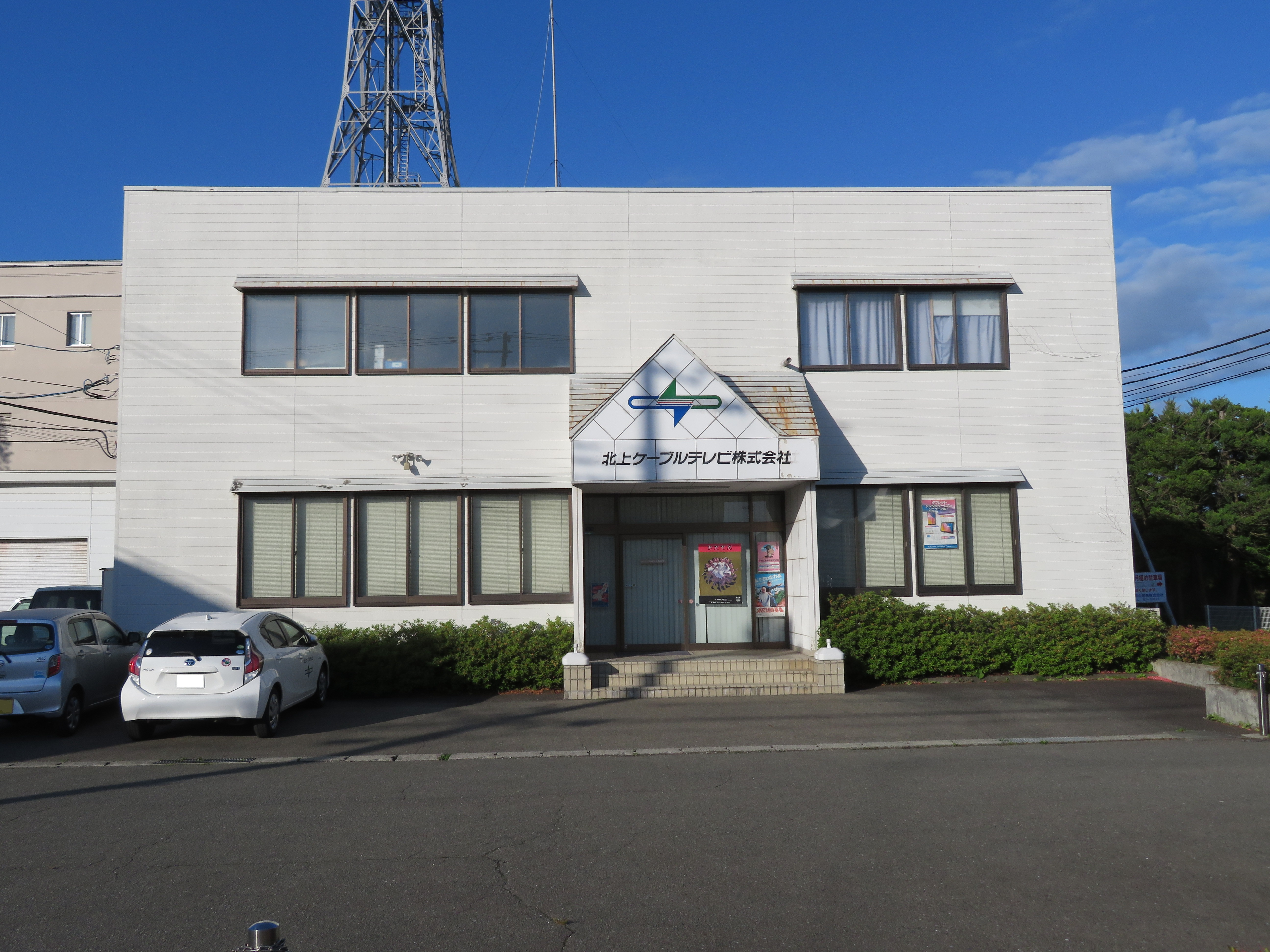 岩手県北上市にある北上ケーブルテレビ株式会社社屋